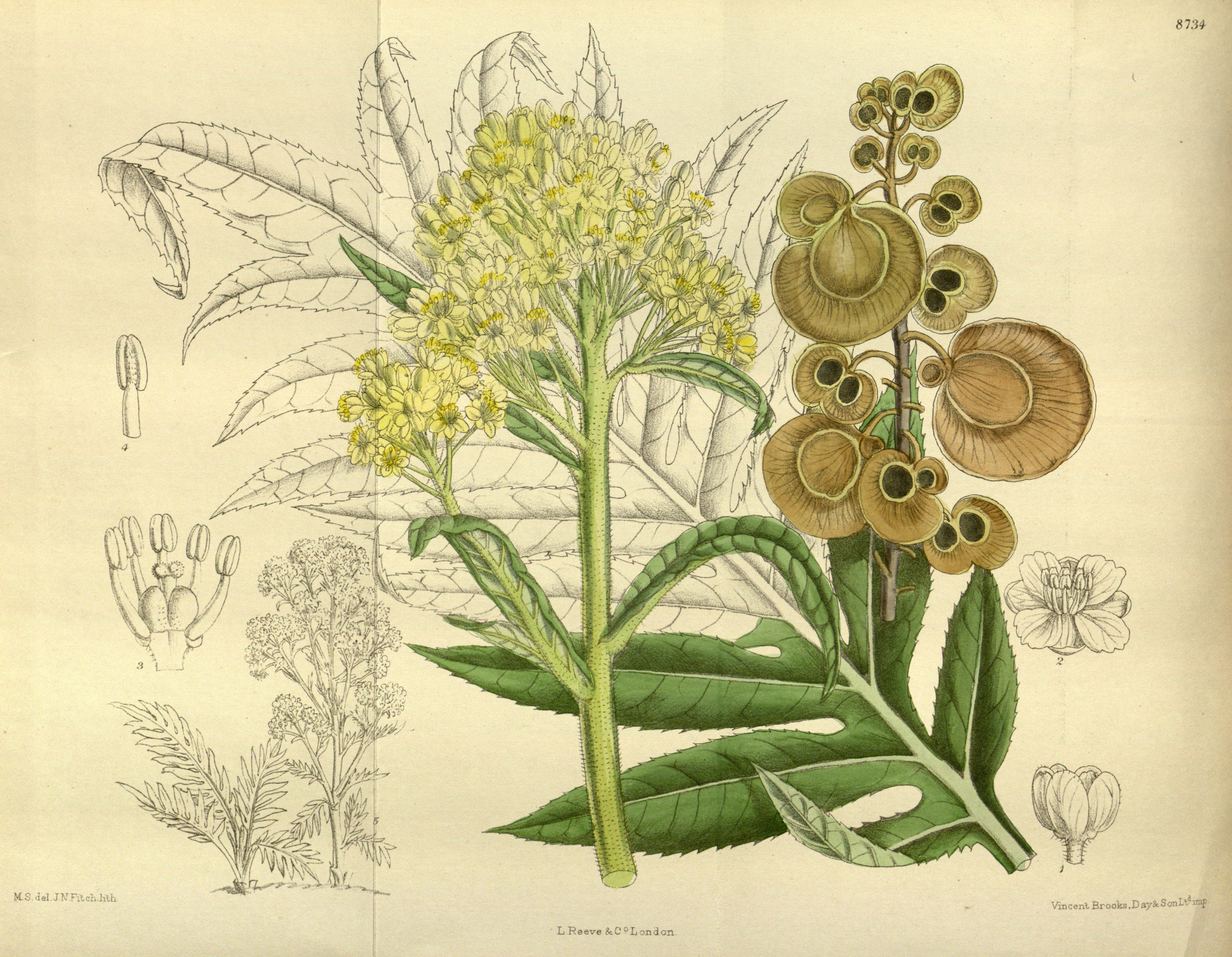 Megacarpaea polyandra, Brassicaceae